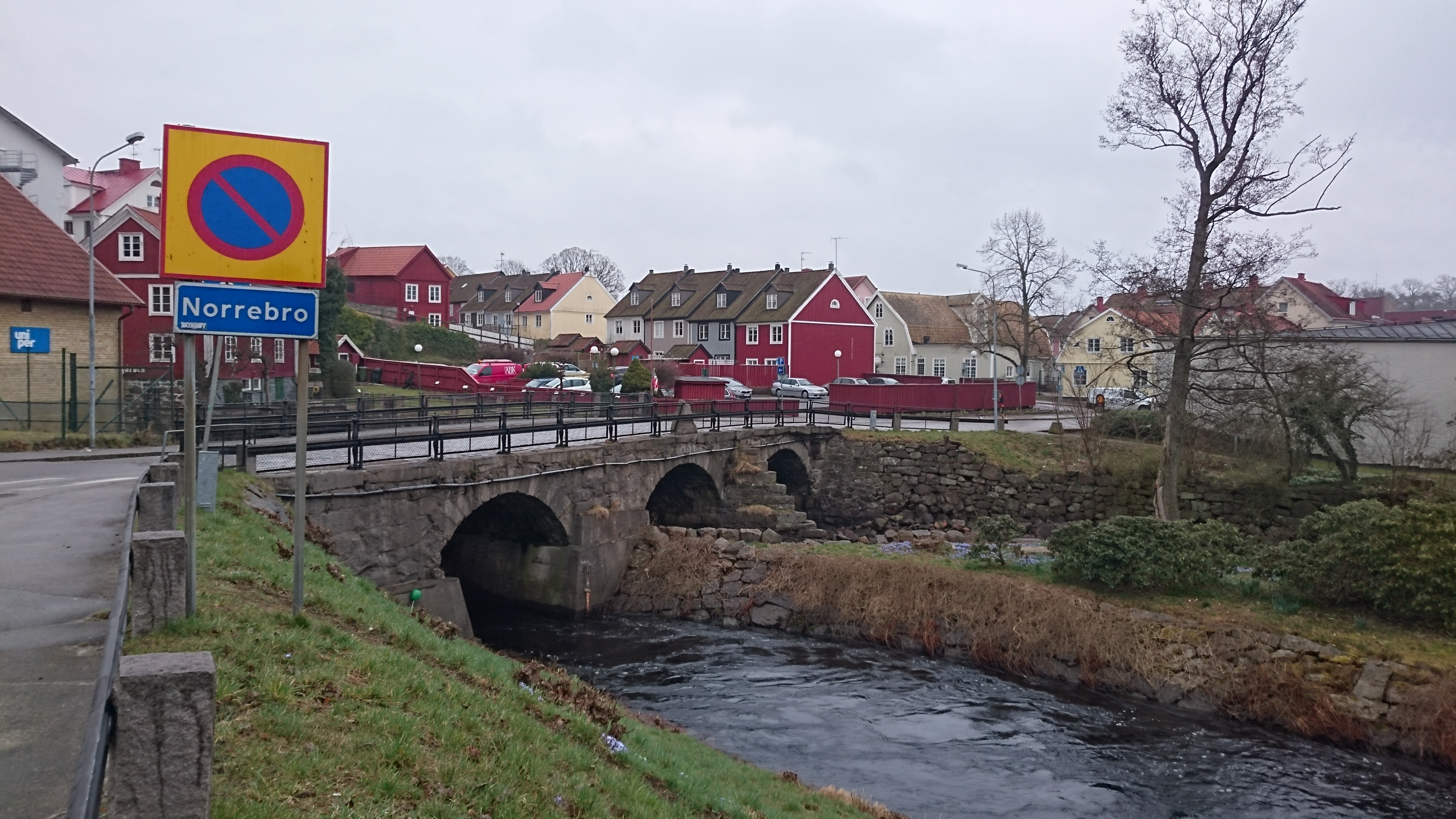 Norrebro i Ronneby 2017. Foto från norr mot söder.